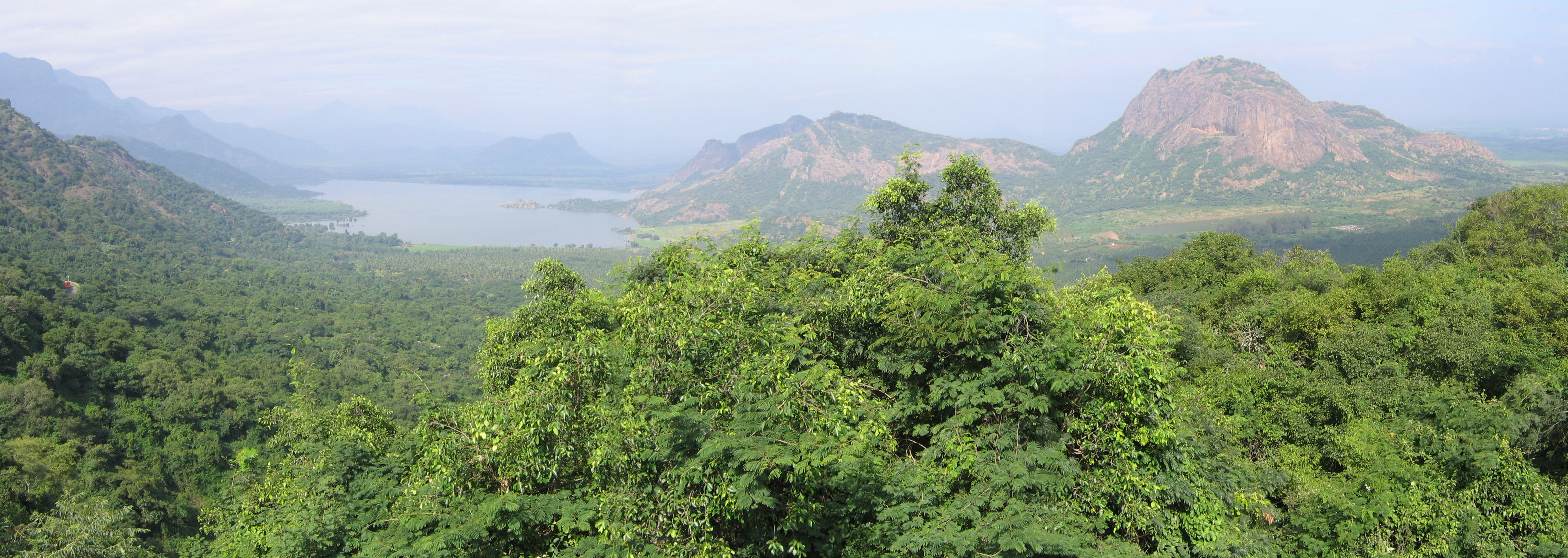 Palani Hills en route Kodaikanal